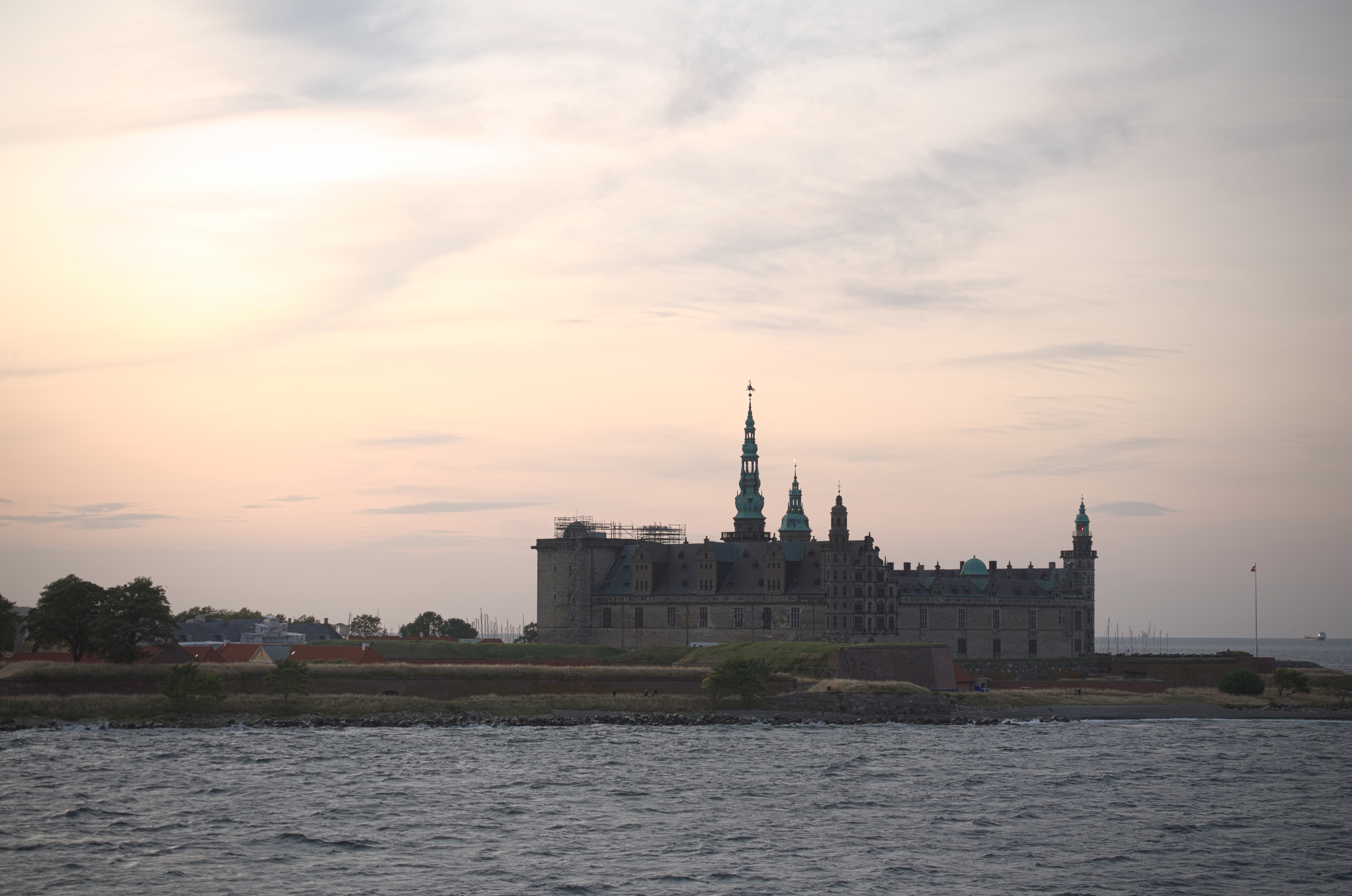 Wasseransicht von Schloss Kronborg